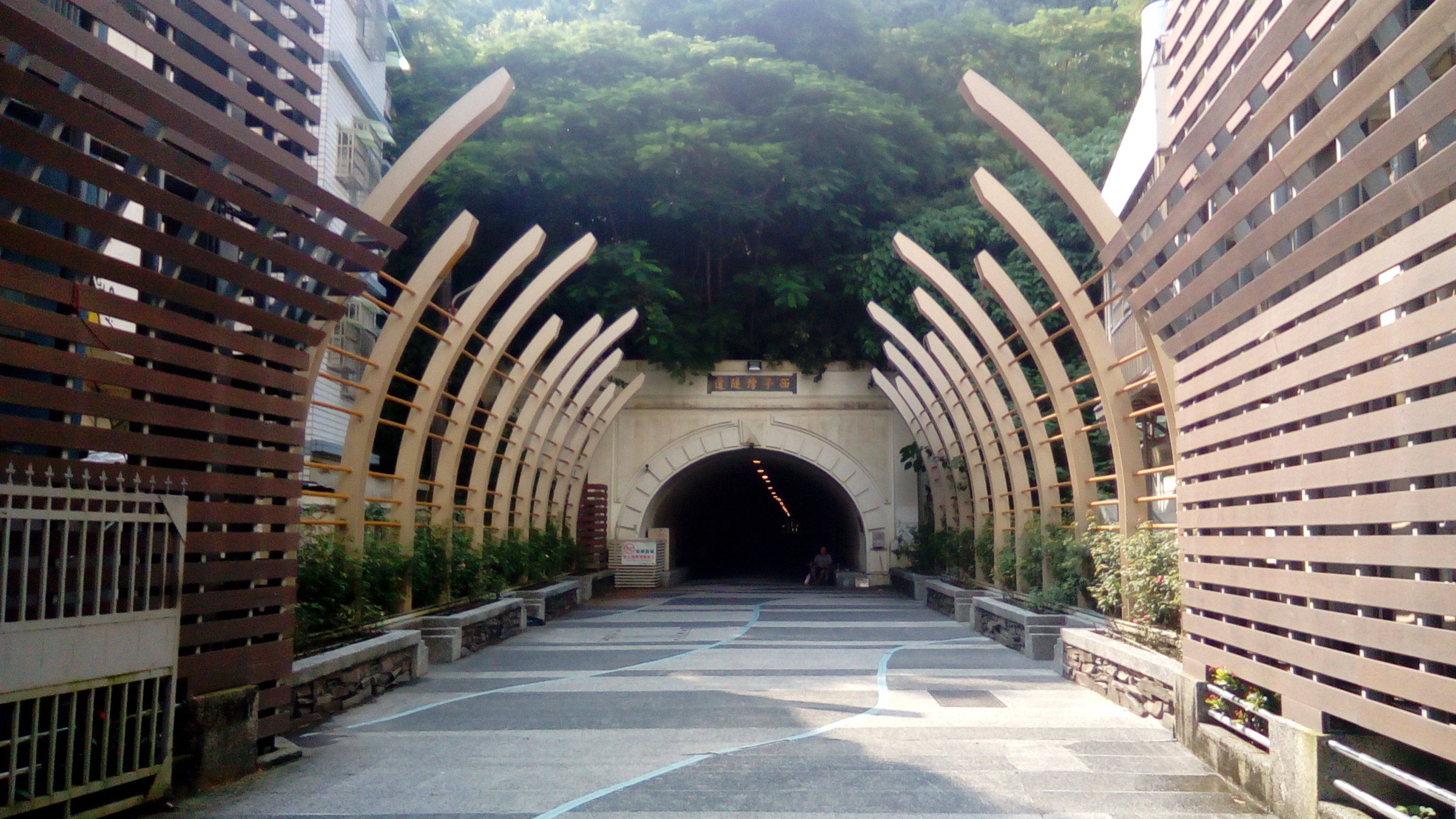 西子灣隧道